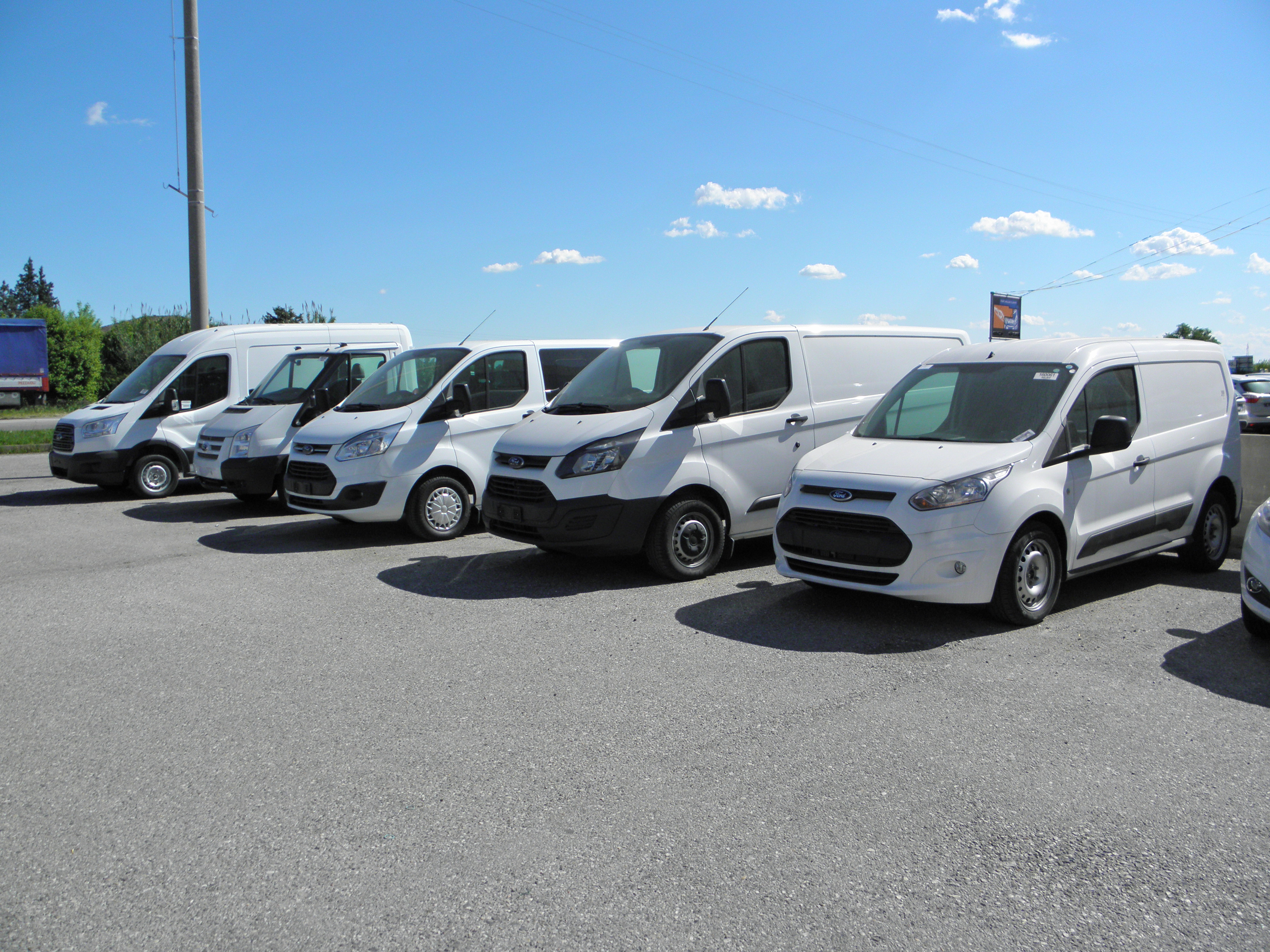 Serie di veicoli commerciali Ford fotografati a Rovigo nel piazzale del concessionario di zona.